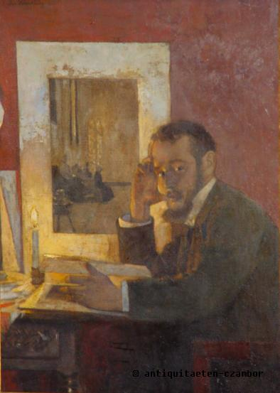 Bildnis von Otto Sohn-Rethel im Schein einer Kerze